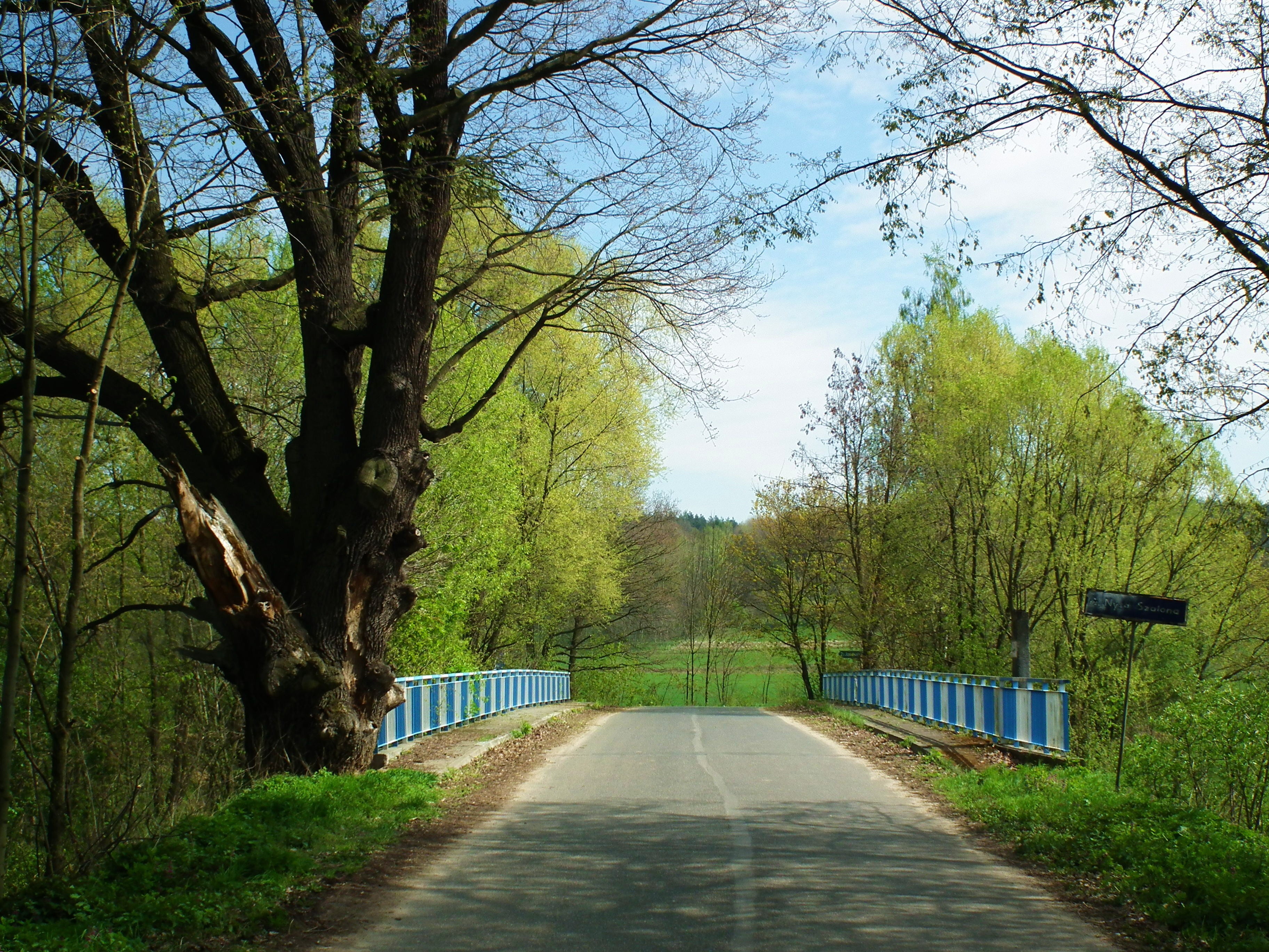 Most na Nysie Szlonej w Krajowie.